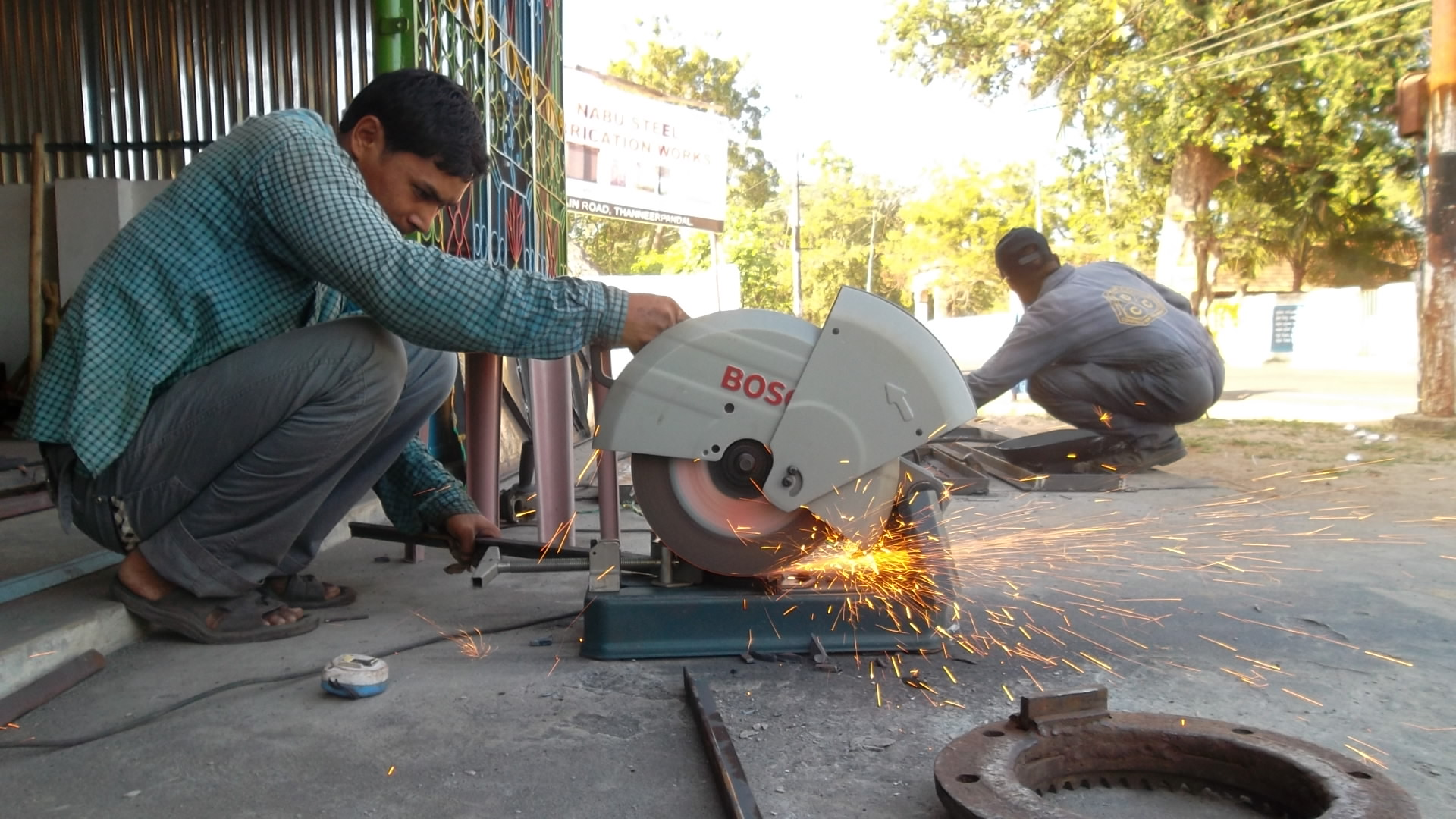 வெல்டிங் செய்பவர்